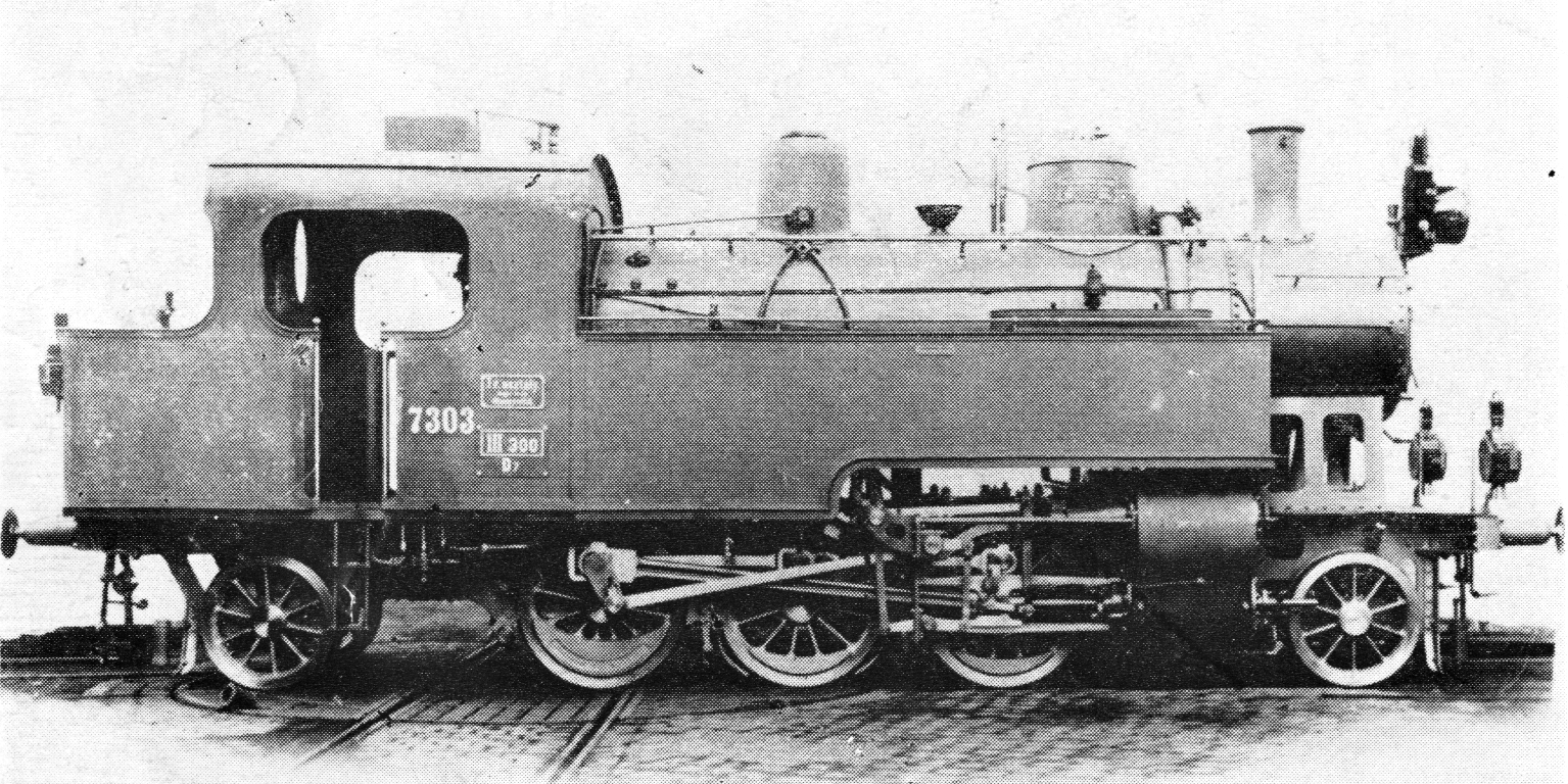 A MÁV TV. osztályú (később 375 sorozatú) mozdonya